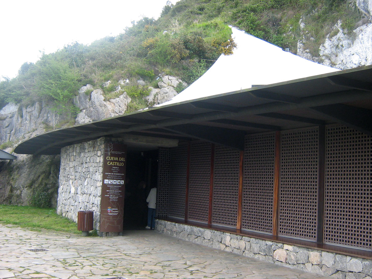 Entrada cubierta a la cueva del Castillo, enmarcada en un complejo de cuevas en Puente Viesgo, Cantabria. A pesar del aspecto no se trata de un centro de interpretación, sino del propio acceso a la cueva.